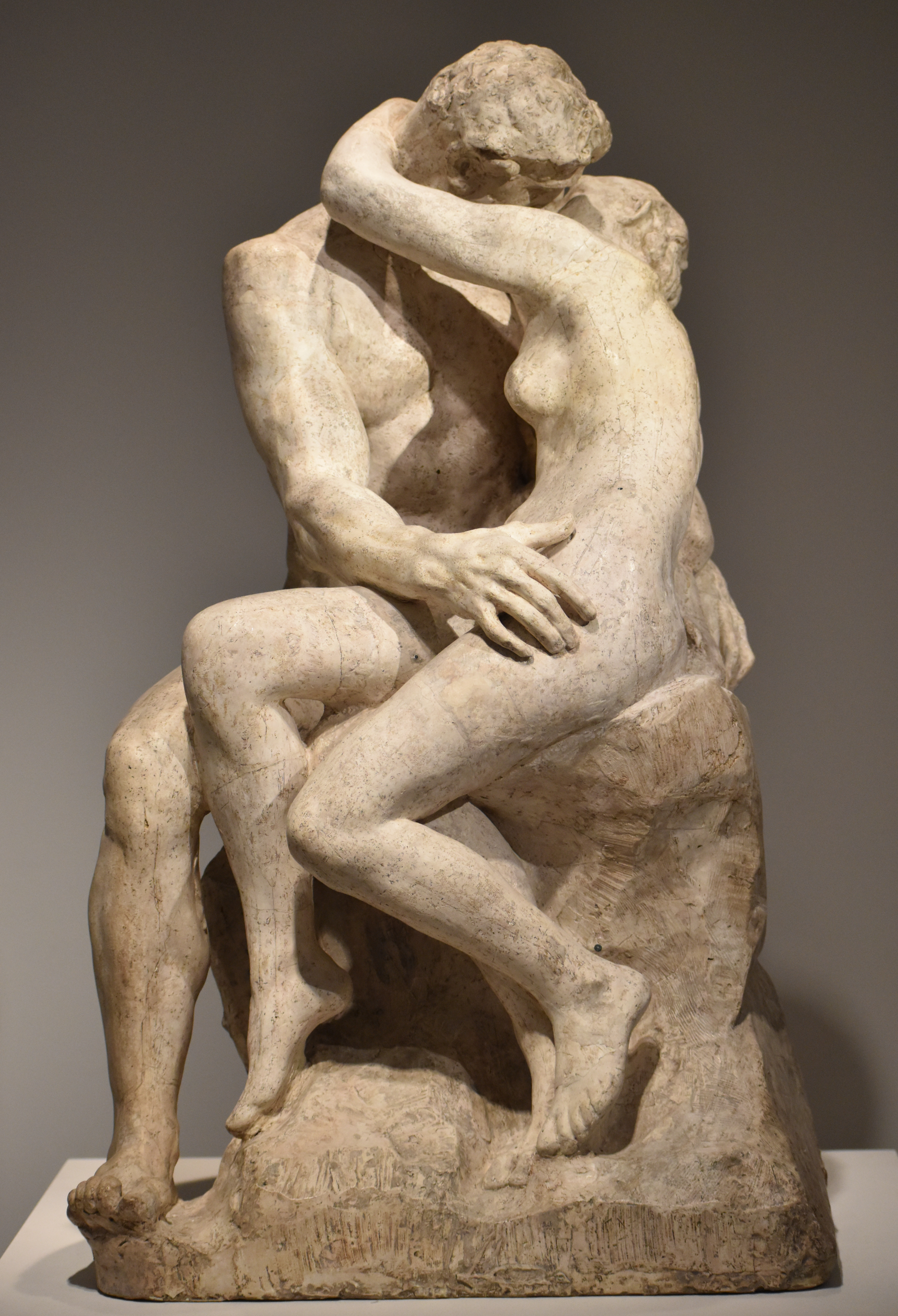 Le Baiser de Rodin, vers 1881-1882. Plâtre patiné, Musée de Rodin, Paris (Numéro d'inventaire : S.02834 et Joconde database: entry 000SC008792). Modèle présentant l'état original du groupe. Présent lors de l'exposition temporaire du Musée Hyacinthe Rigaud "Rodin - Maillol Face à face" de 2019.